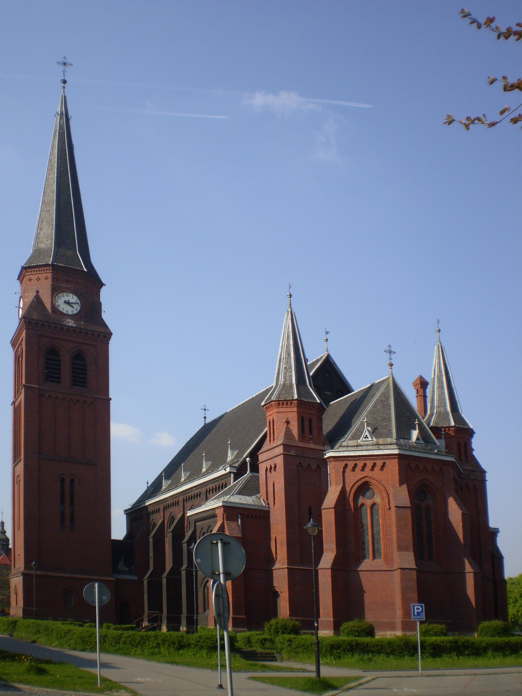 Novogotický kostel svatého Pavla v Ostravě-Vítkovicích.